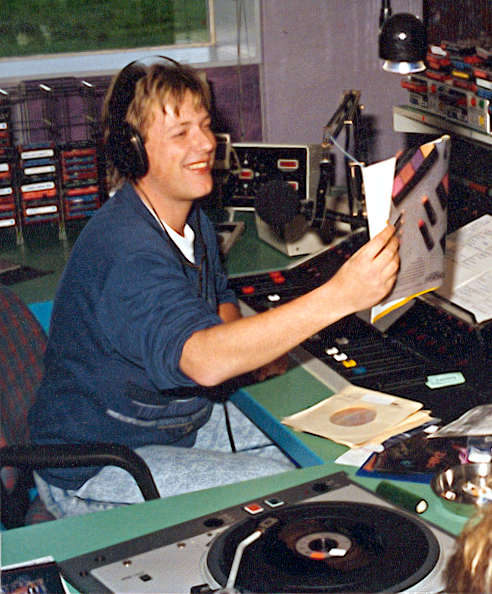 Bart van Leeuwen (pseudoniem van Ton Egas, 2 juli 1954 in Dordrecht) is een Nederlandse diskjockey. Eigen foto